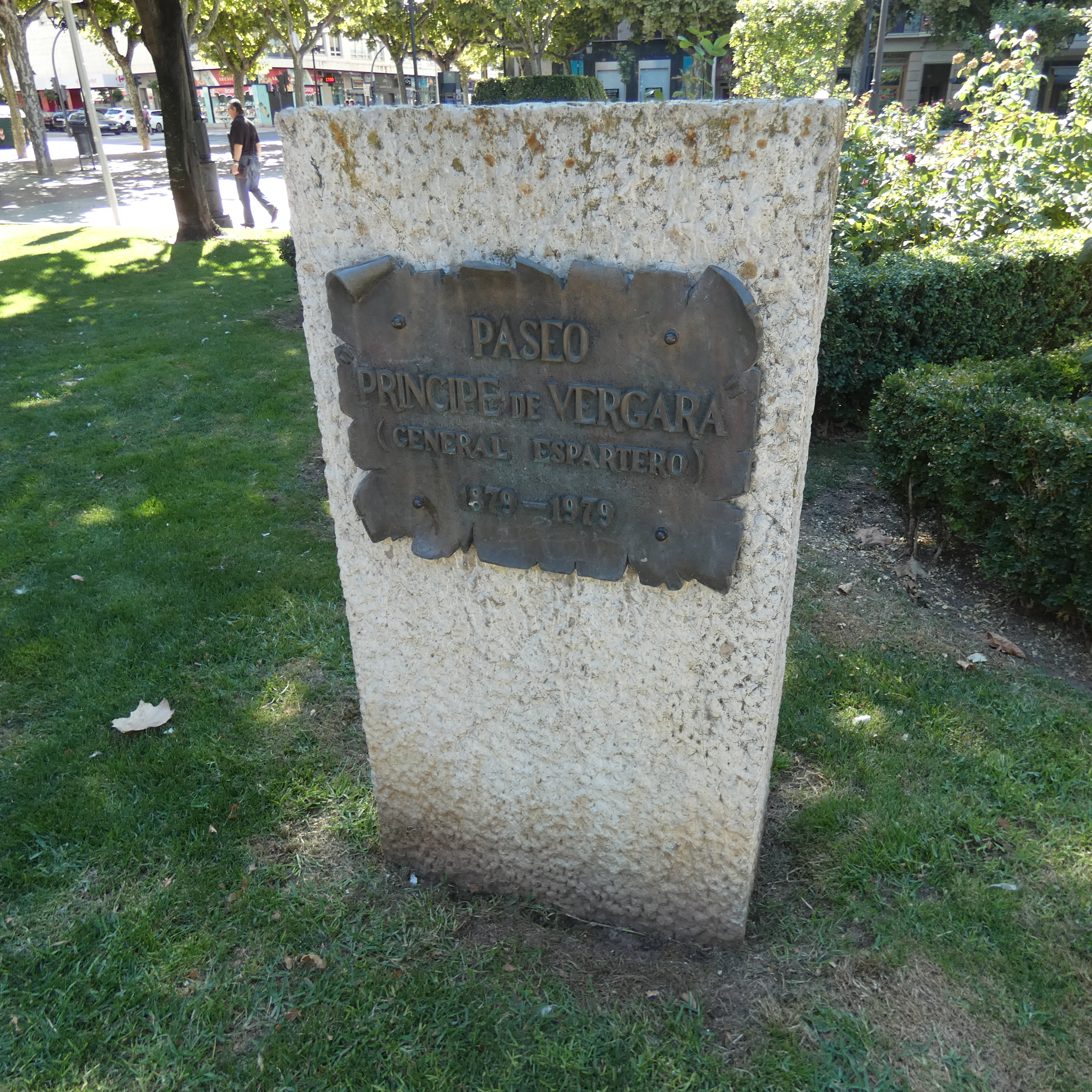 Placa Paseo del Príncipe de Vergara